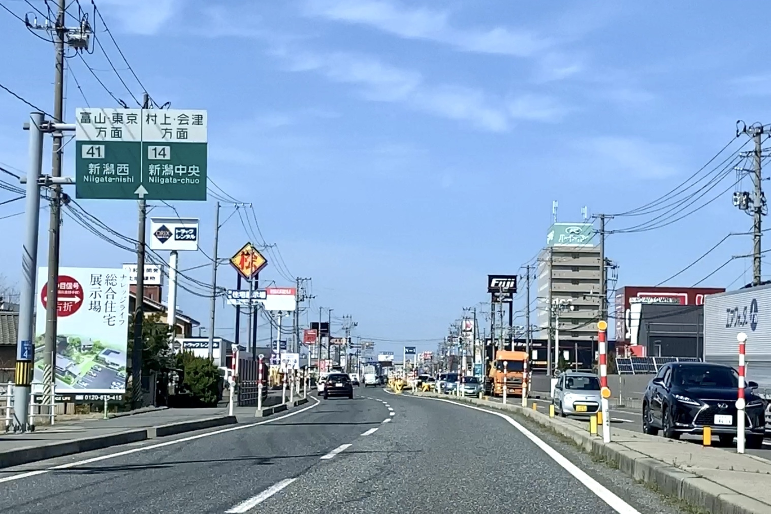 国道8号 旧黒埼町内（新潟市西区，2020年3月）